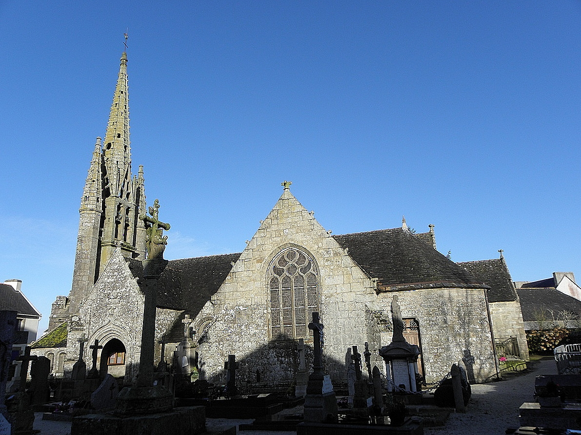 Église Saint-Germain de Kerlaz (29). Vue méridionale.